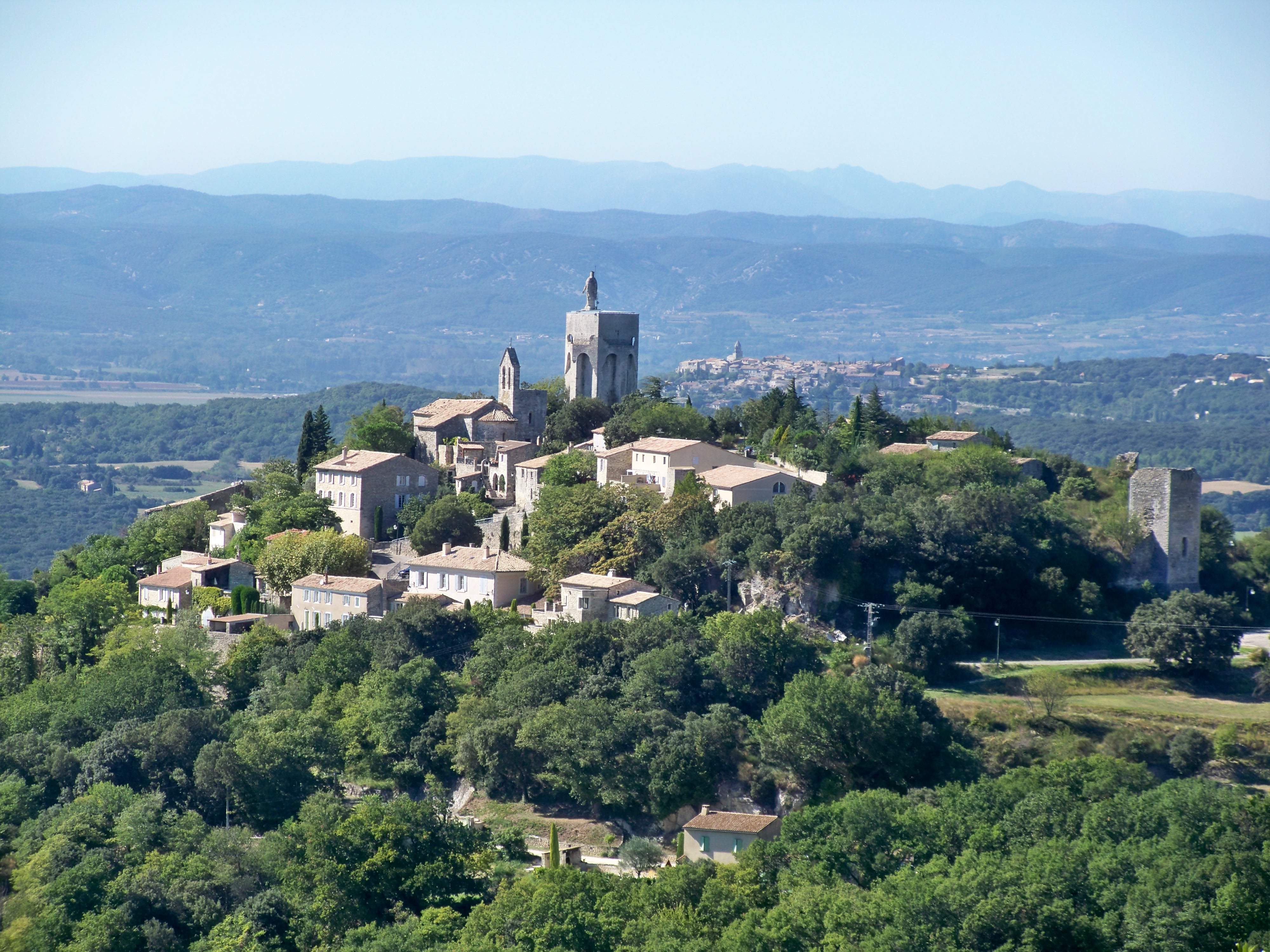 vue sur le village de Clansayes (26)